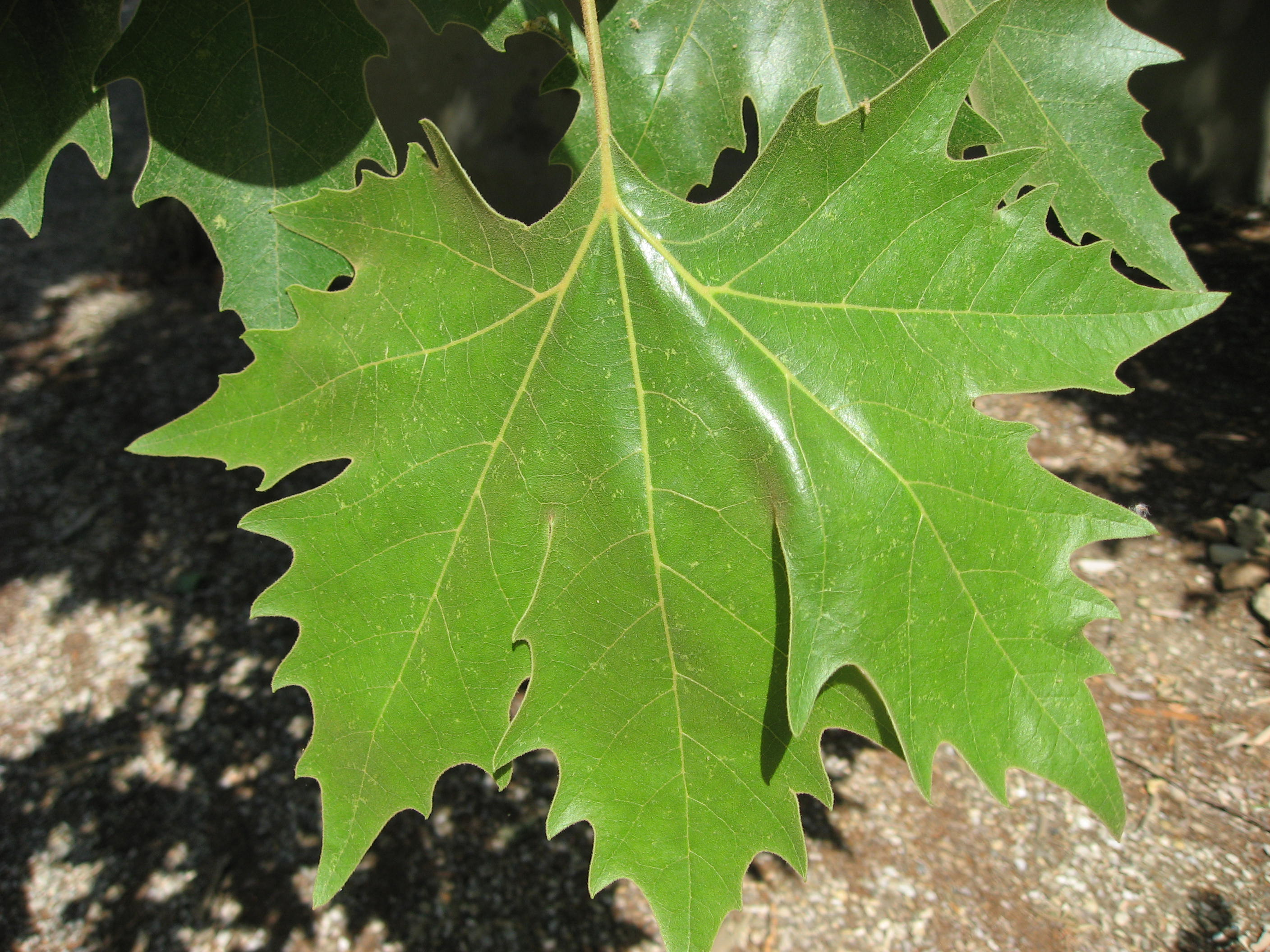 Platanus x acerifolia fruit in Giardino dei Semplici di Firenze Map: 43° 46' 45" N 11° 15' 39" E